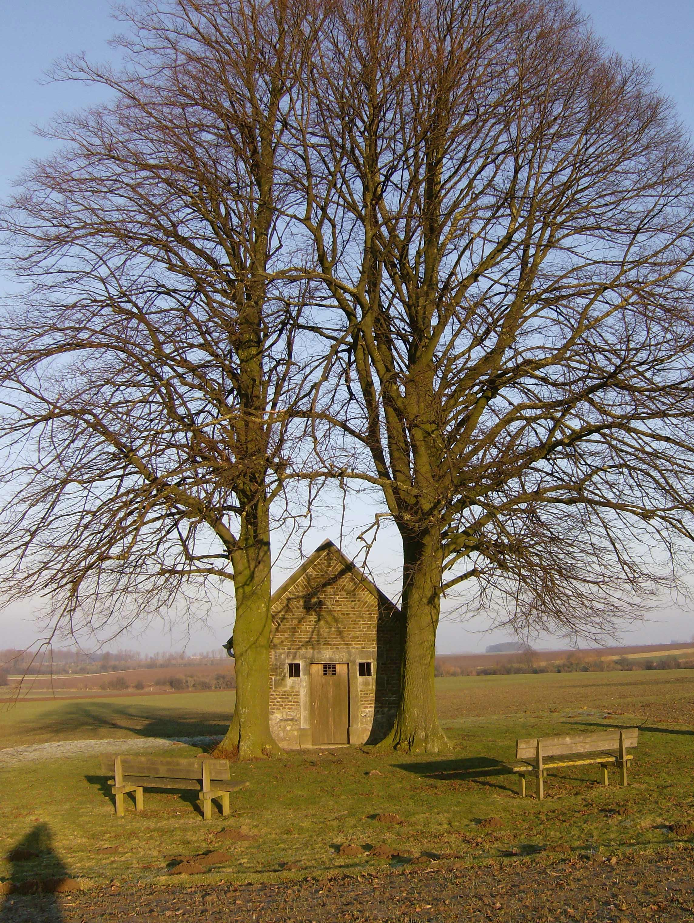 Heilige huisje Herstappe